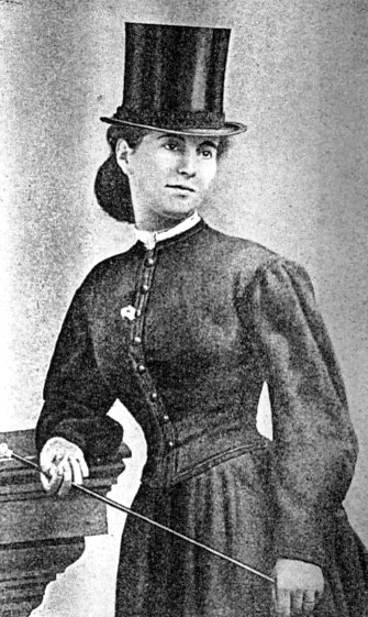 Marguerite Bellanger